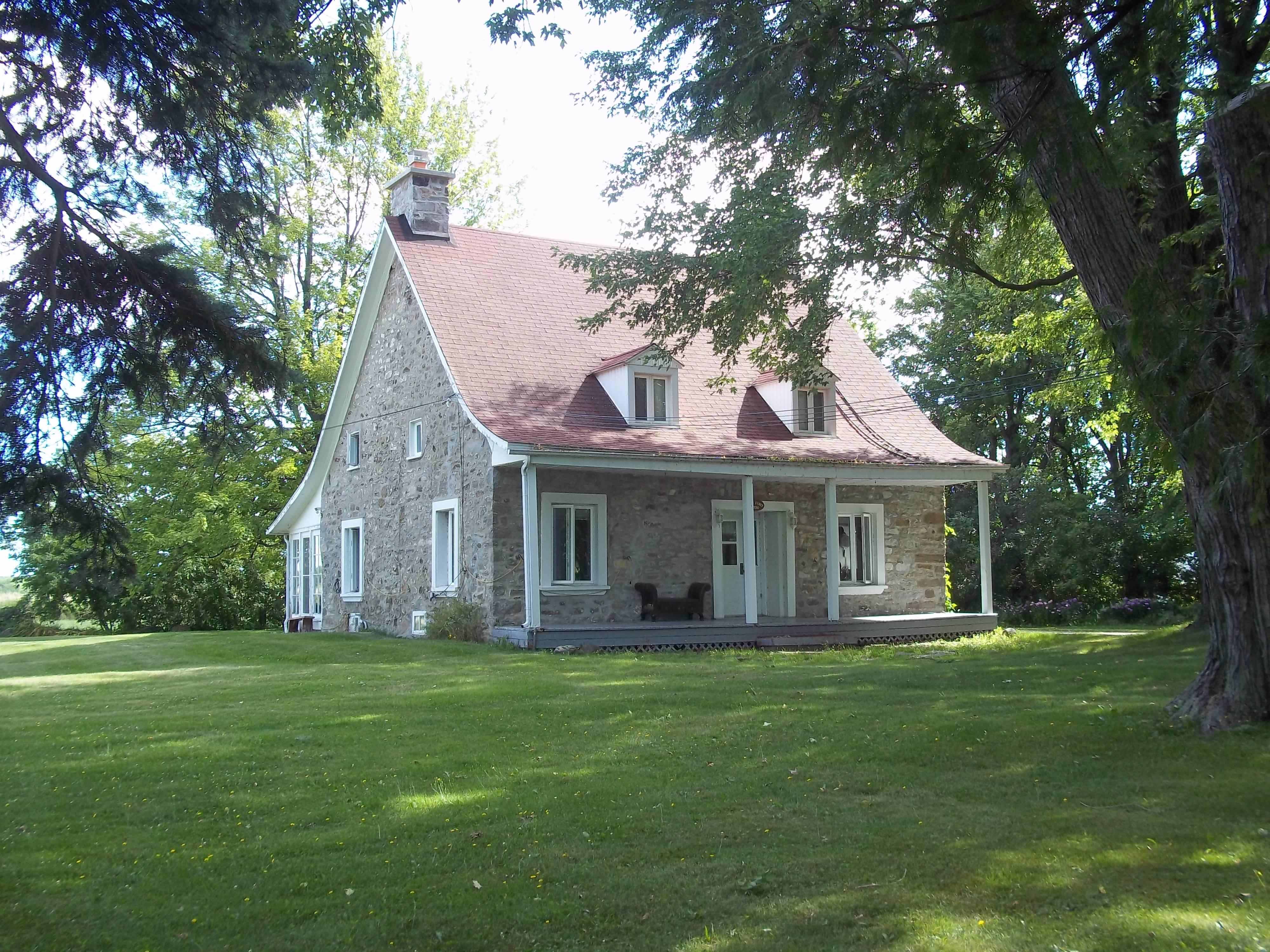 19530 boulevard Gouin Ouest (le Petit Fort), Montréal « Cette maison en moellons de pierre est construite vers 1750. Son rez-de-chaussée, peu dégagé du sol, sa toiture à deux versants, ses lucarnes et ses cheminées encastrées dans les murs latéraux sont des éléments caractéristiques de la première génération de maisons de ferme. La maison possède de petites ouvertures étroites qui s'apparentent à des meurtrières. »